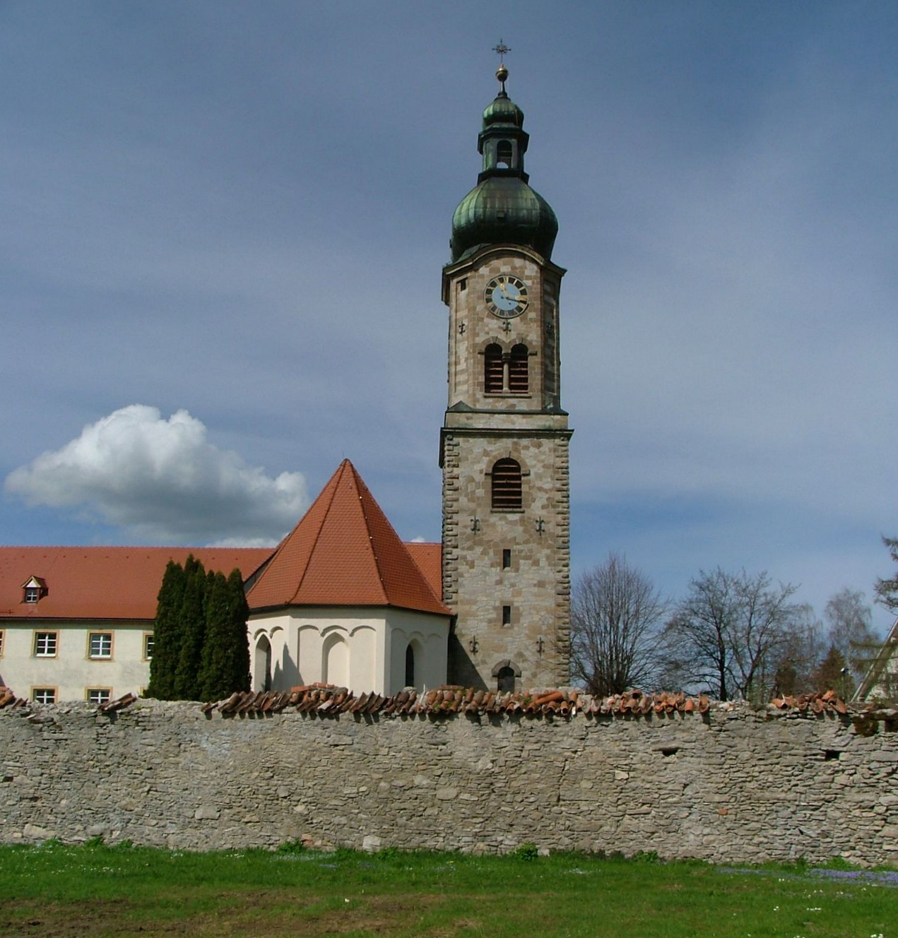 Klosterkirche